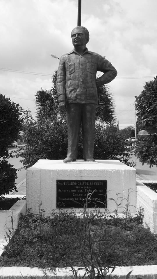 Estatua del Ingeniero Eduardo Chavez sobre el Bulevar Lázaro Cárdenas en Valle Hermoso Tamaulipas.